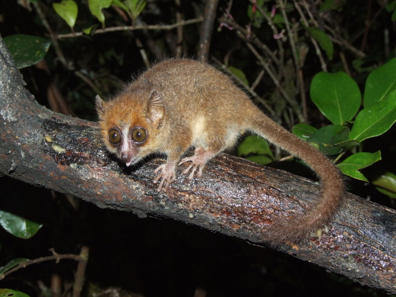 Zwerg-Mausmaki (Microcebus myoxinus)